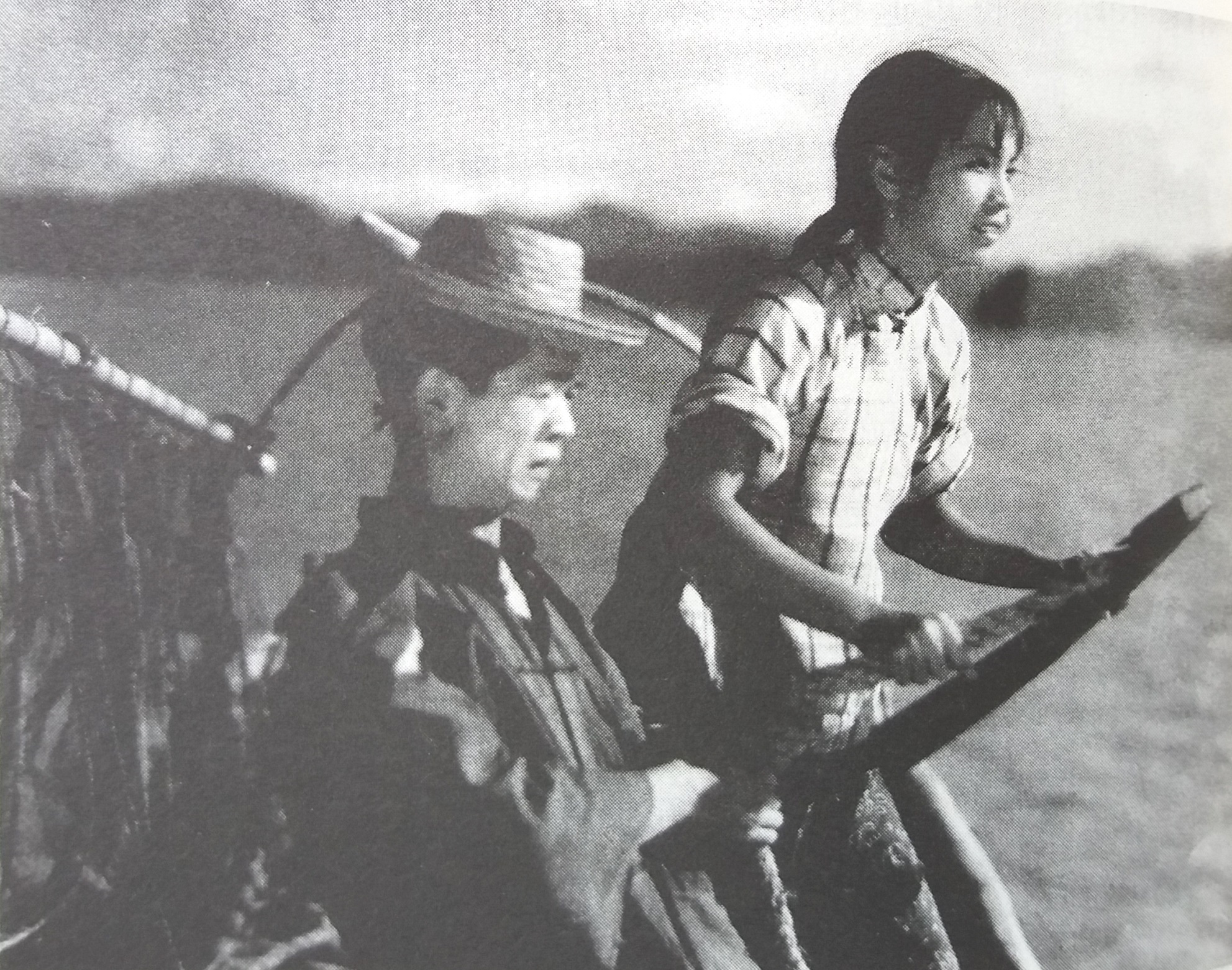 中文（中国大陆）: 《渔光曲》剧照